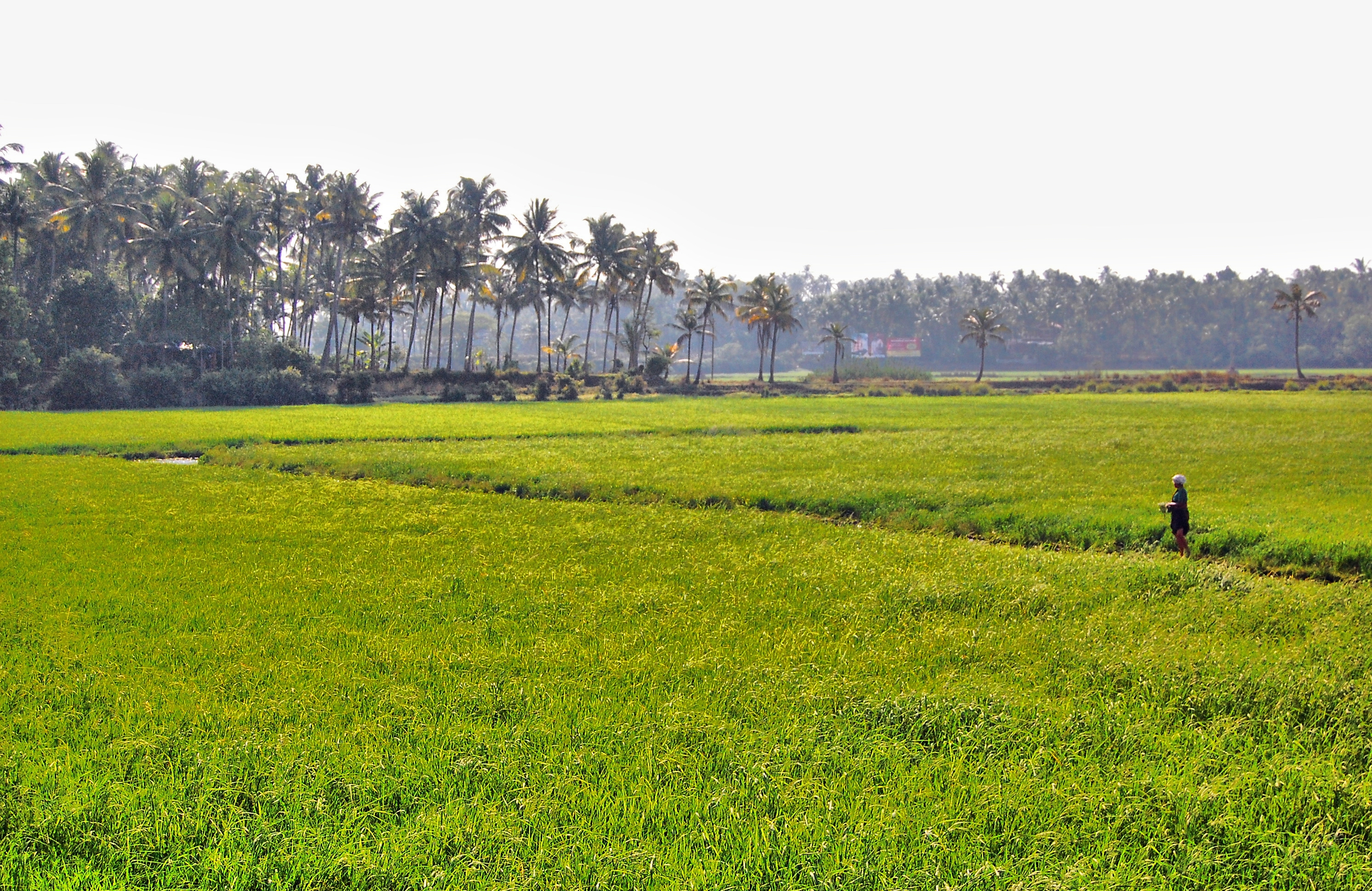 കോൾ പാടങ്ങളിലെ നെൽകൃഷി